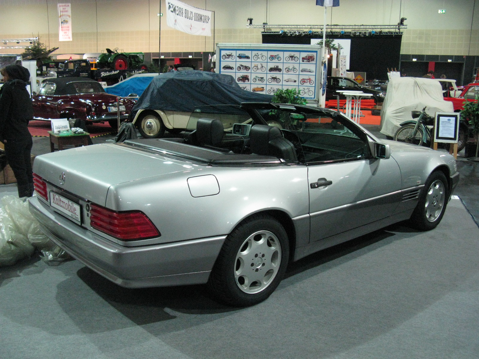 Mercedes-Benz SL320 W129